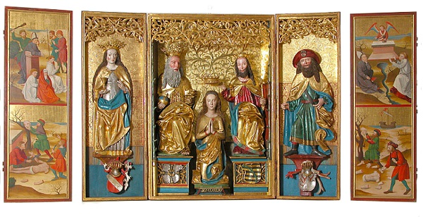 Marienaltars aus Tenkitten im Samland zeigt Krönung der Mutter Gottes im mittleren Schrank sowie die Hl. Barbara und der Hl Jacobus auf den Seitenflügeln. Dieser Altar von 1504 – vermutlich aus einer Nürnberger Werkstatt – war ein gemeinschaftliches Geschenk des Hochmeisters Friedrich von Meißen, des Lochstädter Pflegers von Reitzenstein und des Bernsteinmeisters Leo von Waiblingen an die Kirche in Tenkitten. Nach dem Einsturz der Kirche am 24. November 1669 gelangte er in die Burgkapelle Lochstäedt, wurde aber bald darauf verkauft. Später erwarb Herr von Blell–Tüngen den Altar und spendete ihn nebst vielen anderen Sammlerstücken der Marienburg. Heute ist sie im Marienburger Museum zu besichtigen.